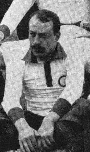 Adolphe de Pallisseaux en 1896 (Écosse-France).